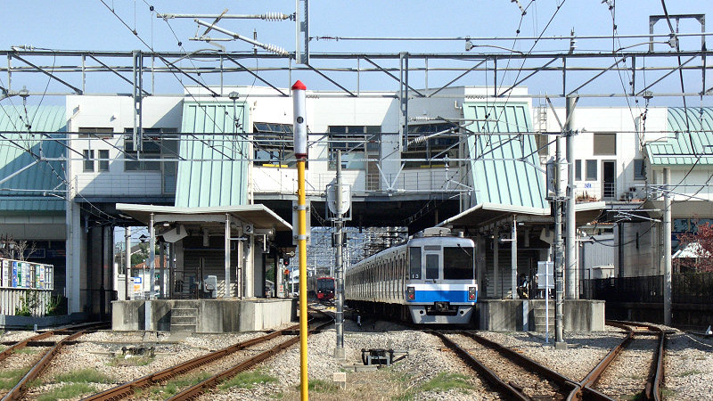 JR筑肥線筑前前原駅 構内の様子（写真奥が姪浜駅方面、写真手前が唐津駅方面）